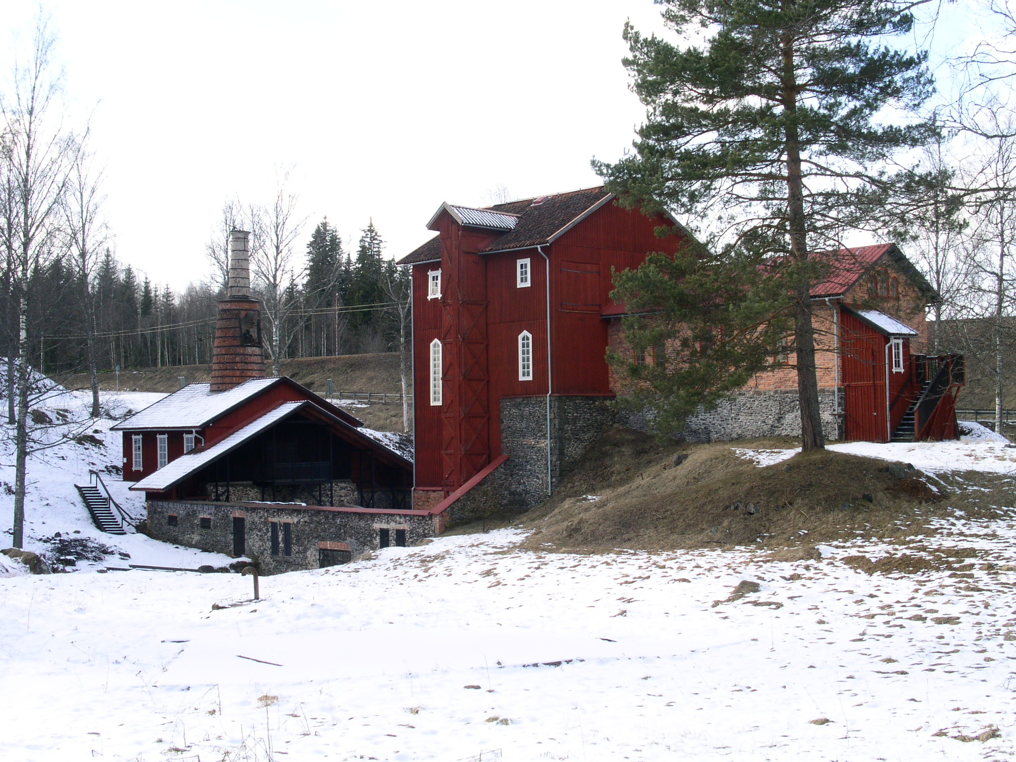 Klenshyttan, hytta mellan Ludvika och Grängesberg